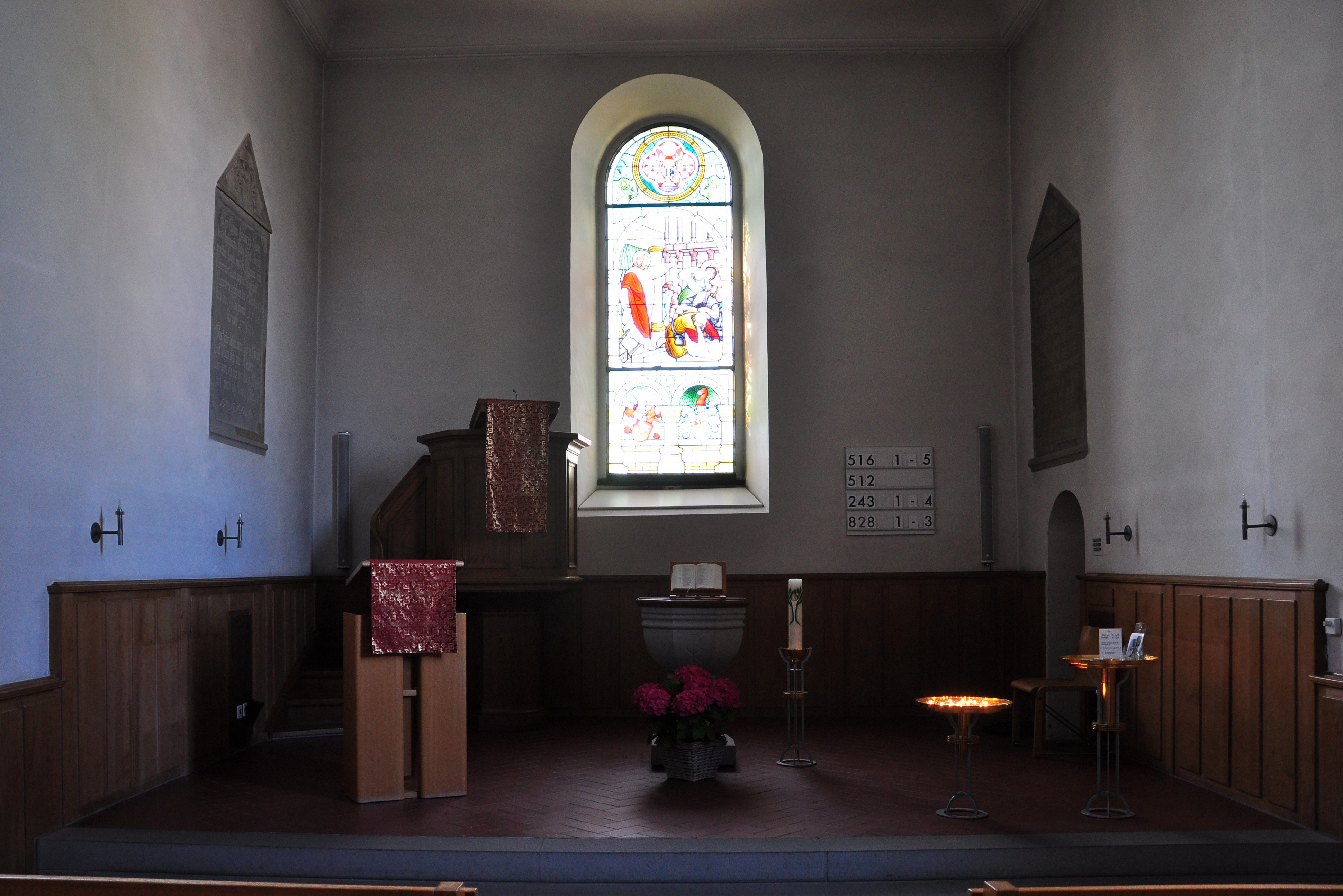 Oberburg in Regensberg (Switzerland)